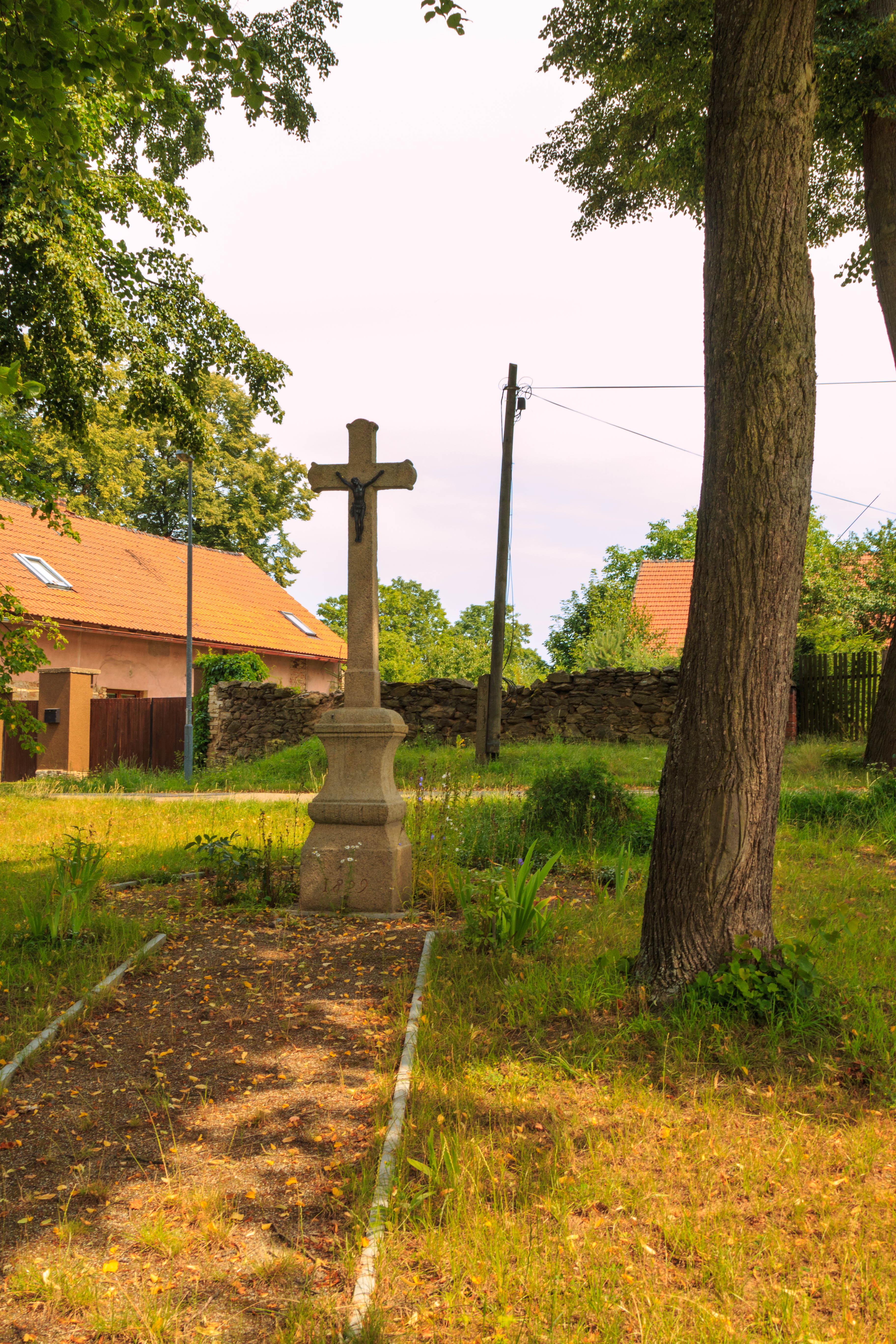 Termesivy křížek